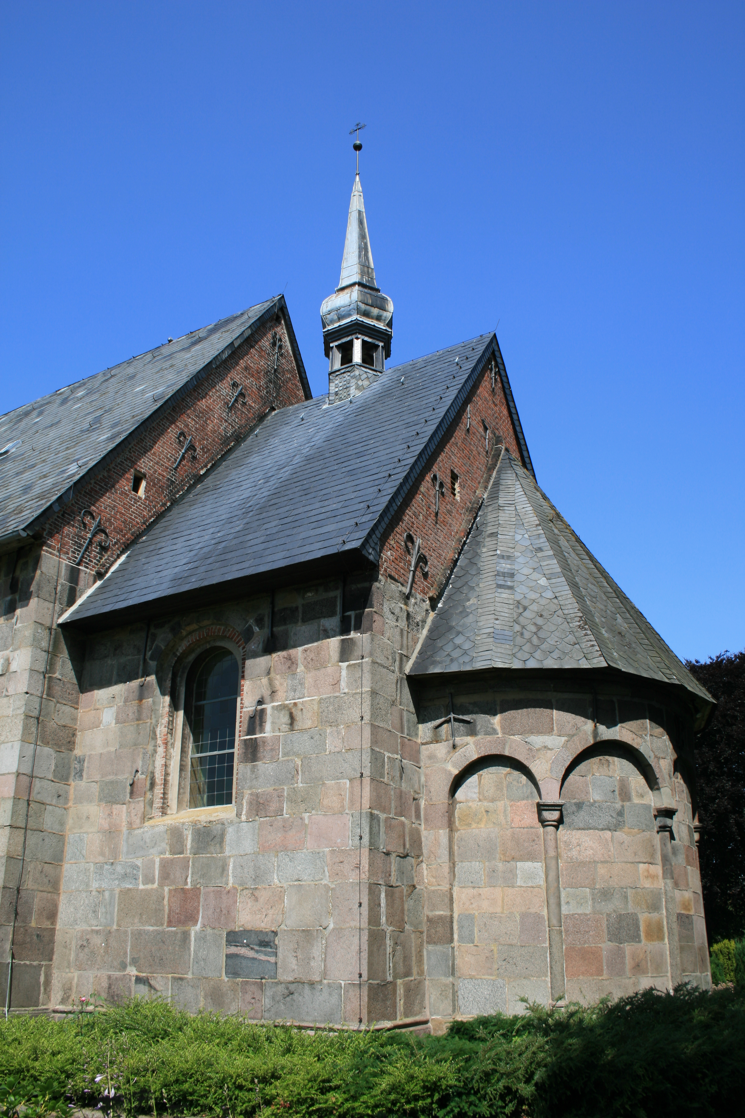 Apsis der St. Marienkirche (Sörup in Angeln)